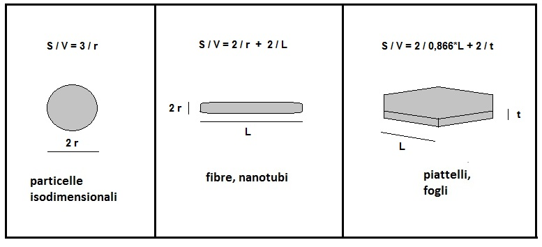 Immagine dei nanorinforzi più comuni con mostrato anche il rapporto superficie/volume.